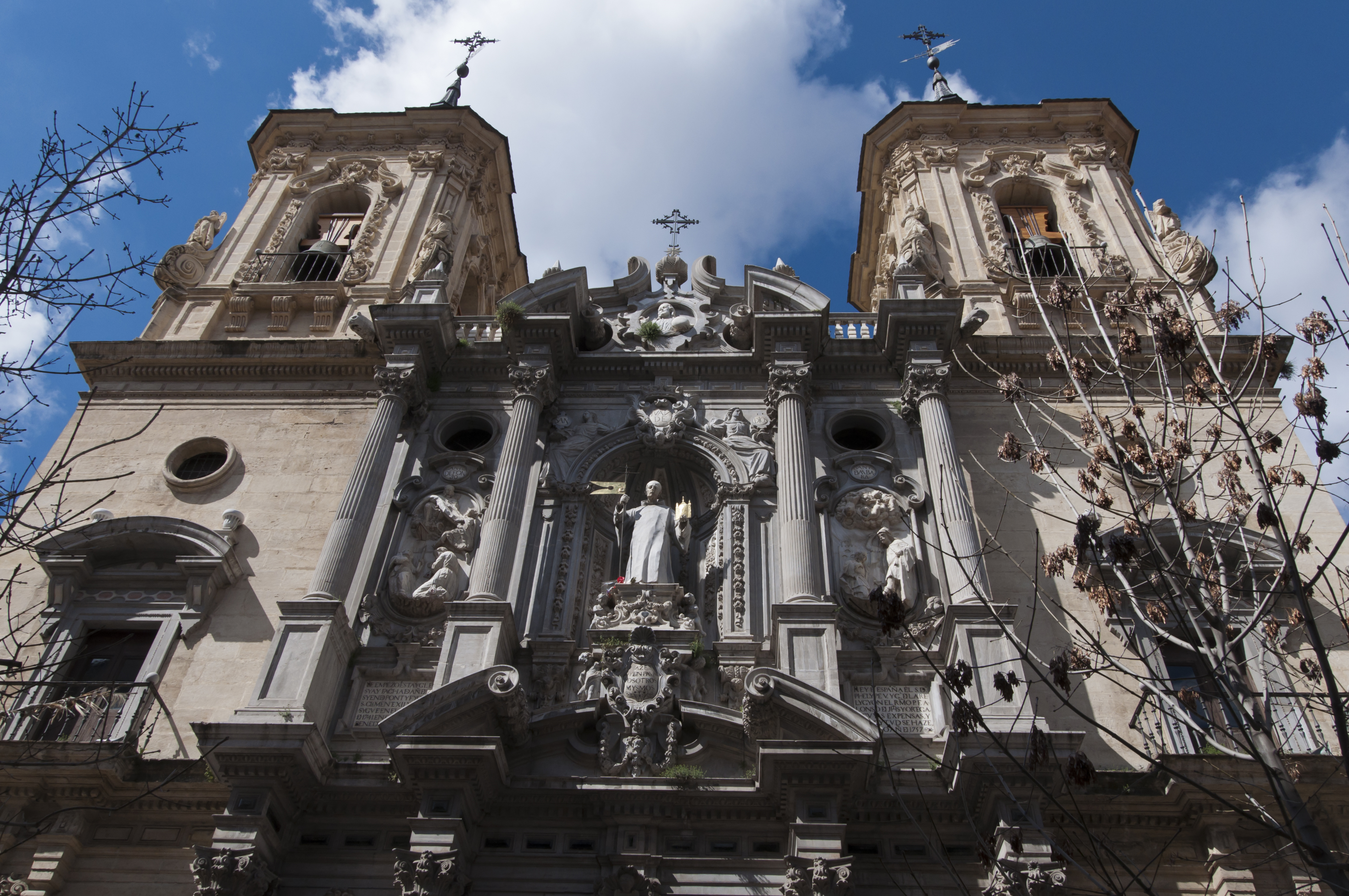 Iglesia de San Juan de Dios in Granada, Spanje